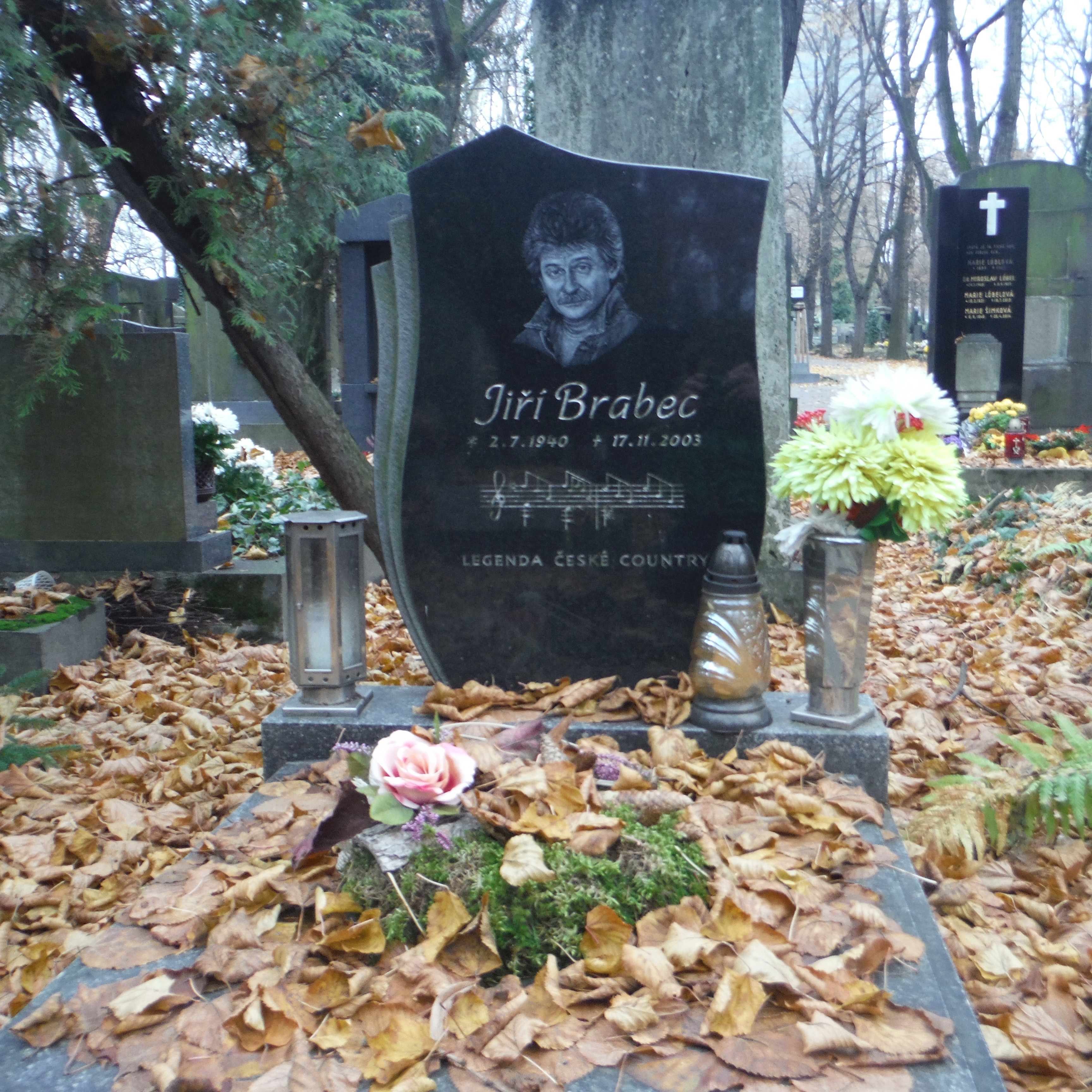 HROB